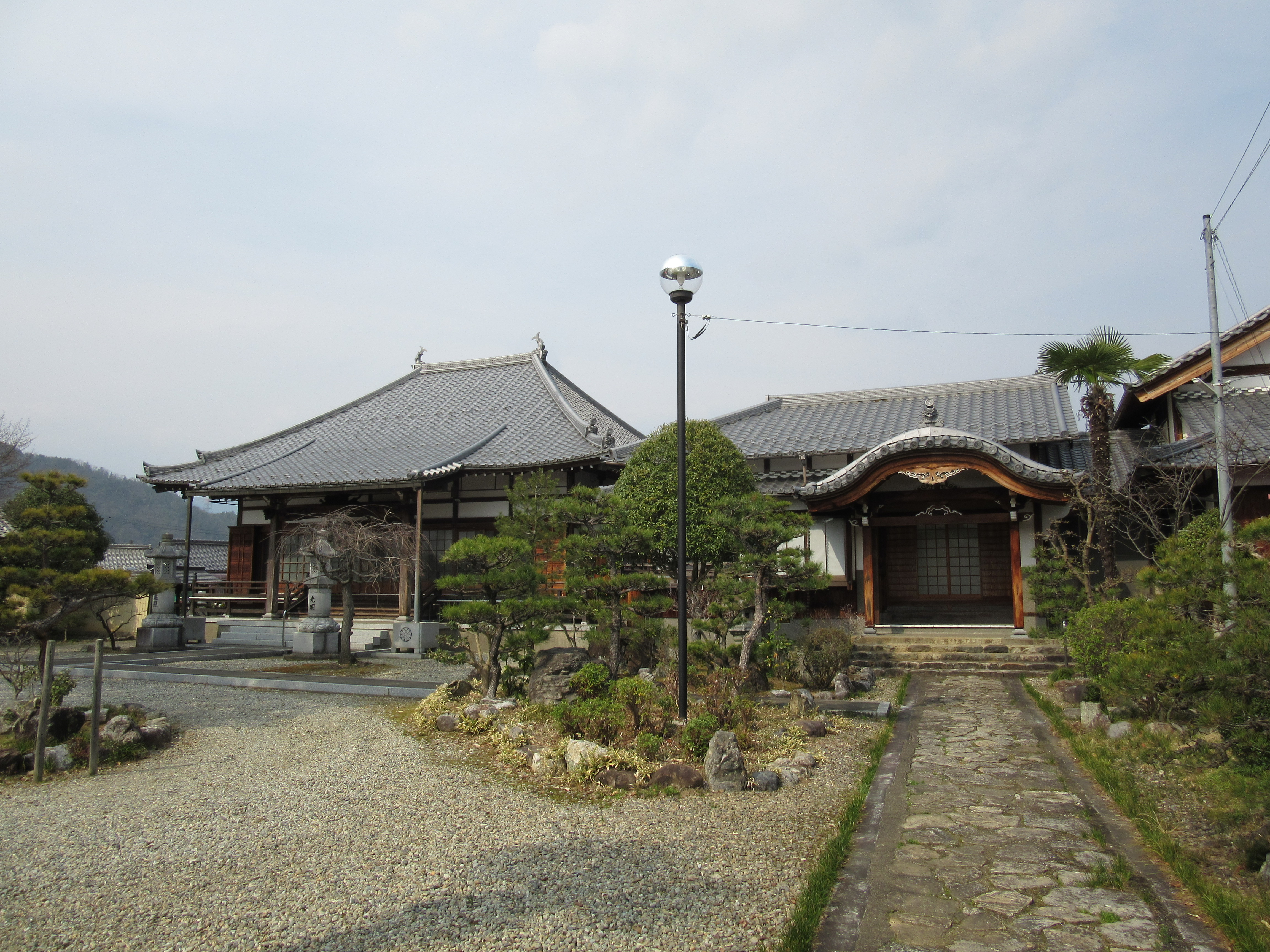 来昌寺本堂